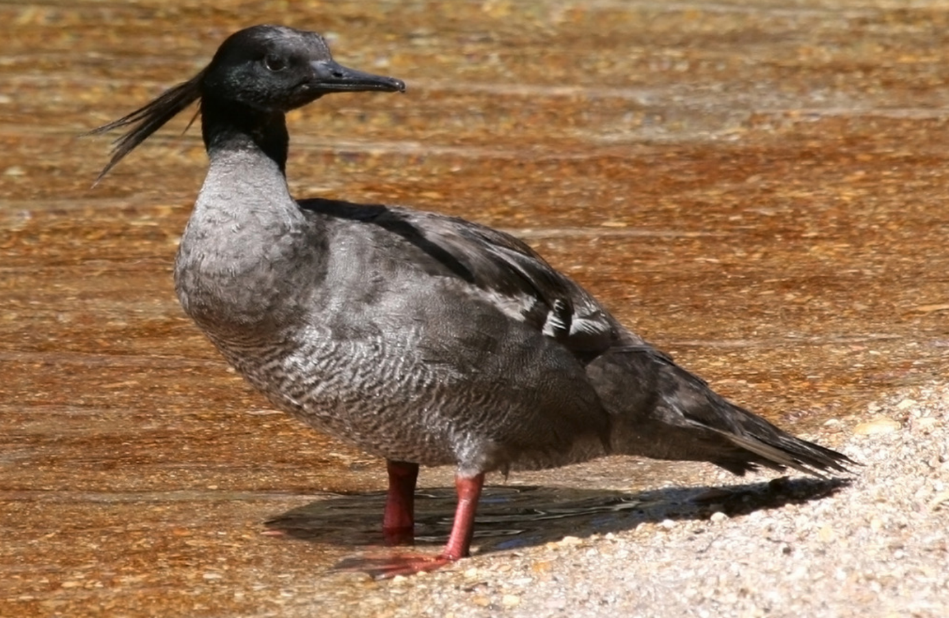 Exemplar macho de Pato-Mergulhão (Mergus octosetaceus), ave criticamente em perigo de extinção, em São Roque de Minas, Minas Gerais, Brasil.